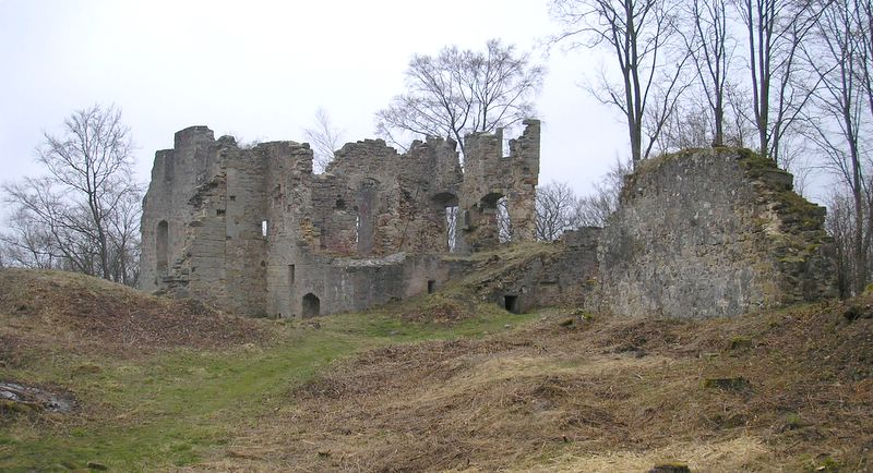 Burg Rauheneck (Haßberge). Der Palas.